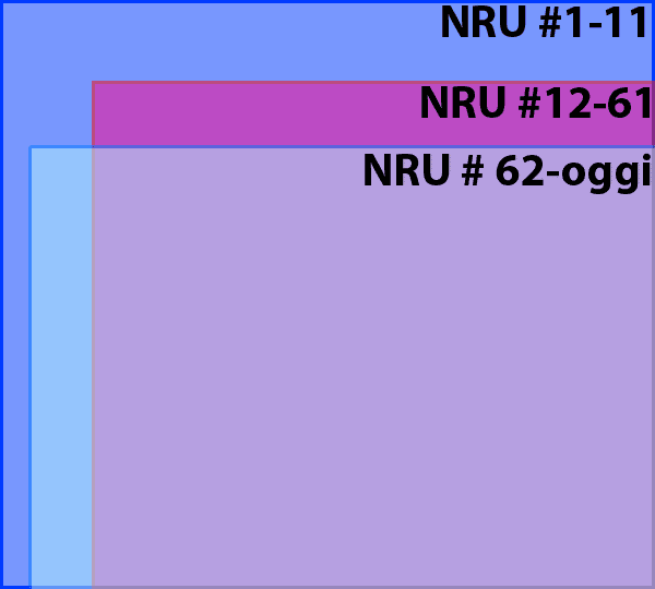 Comparazione dei vari formati di "Nintendo la Rivista Ufficiale" dal primo numero ad oggi - Size comparison of the italian videogames magazine "Nintendo la Rivista Ufficiale" through the years.